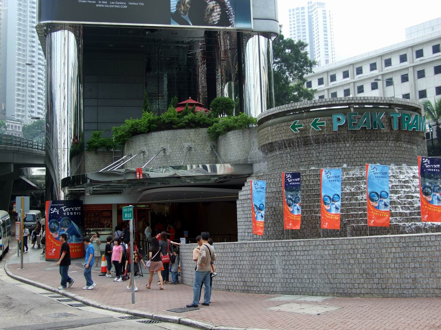 山頂纜車中環總站